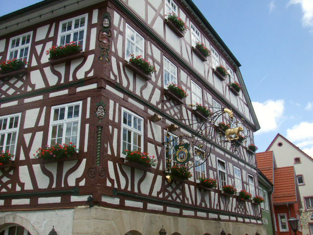 Trochtelfingen, Landkreis Reutlingen Restaurant Ochsen (früher Goldene Krone)